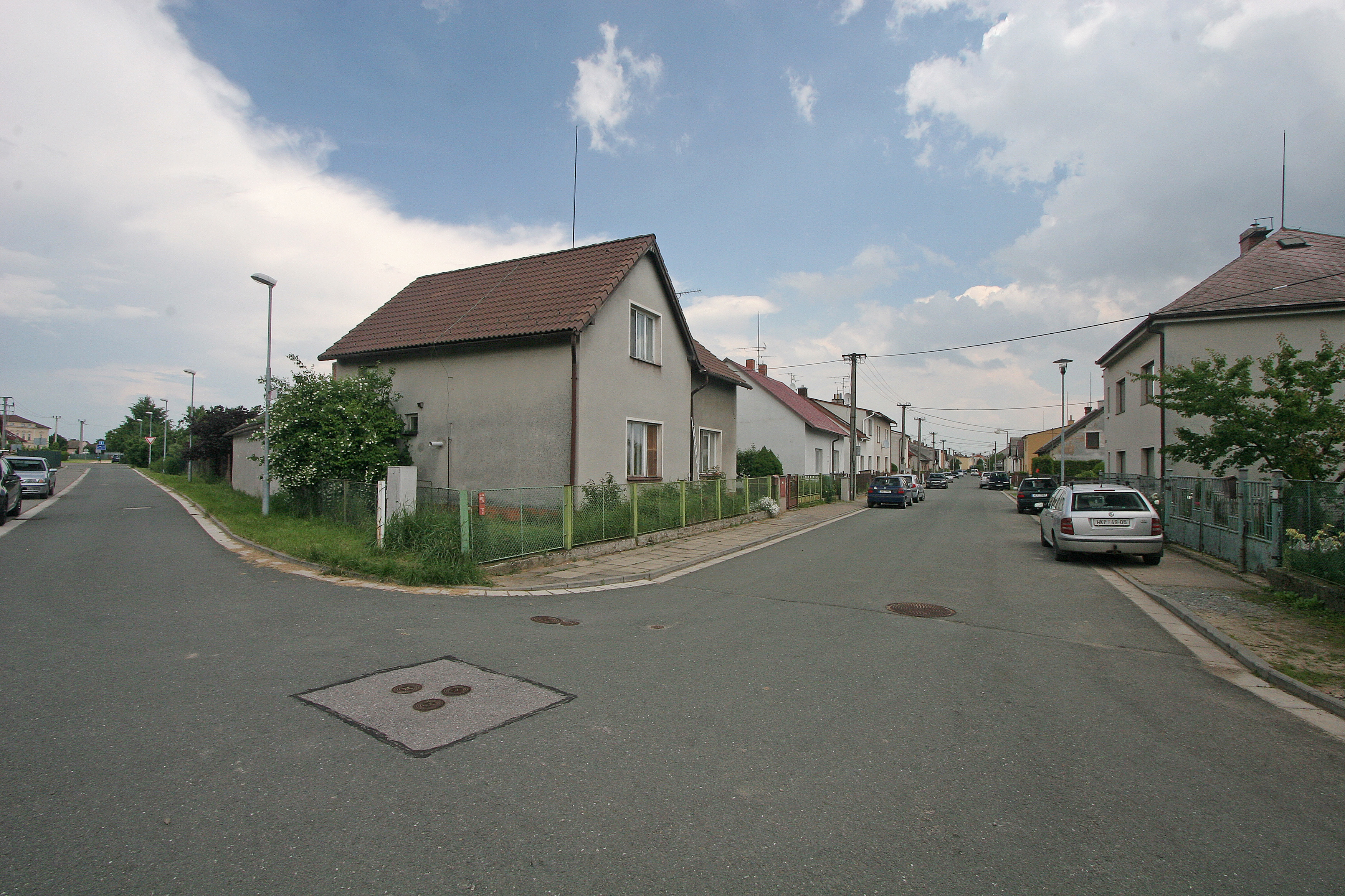 Stěžery Stará parcela 113